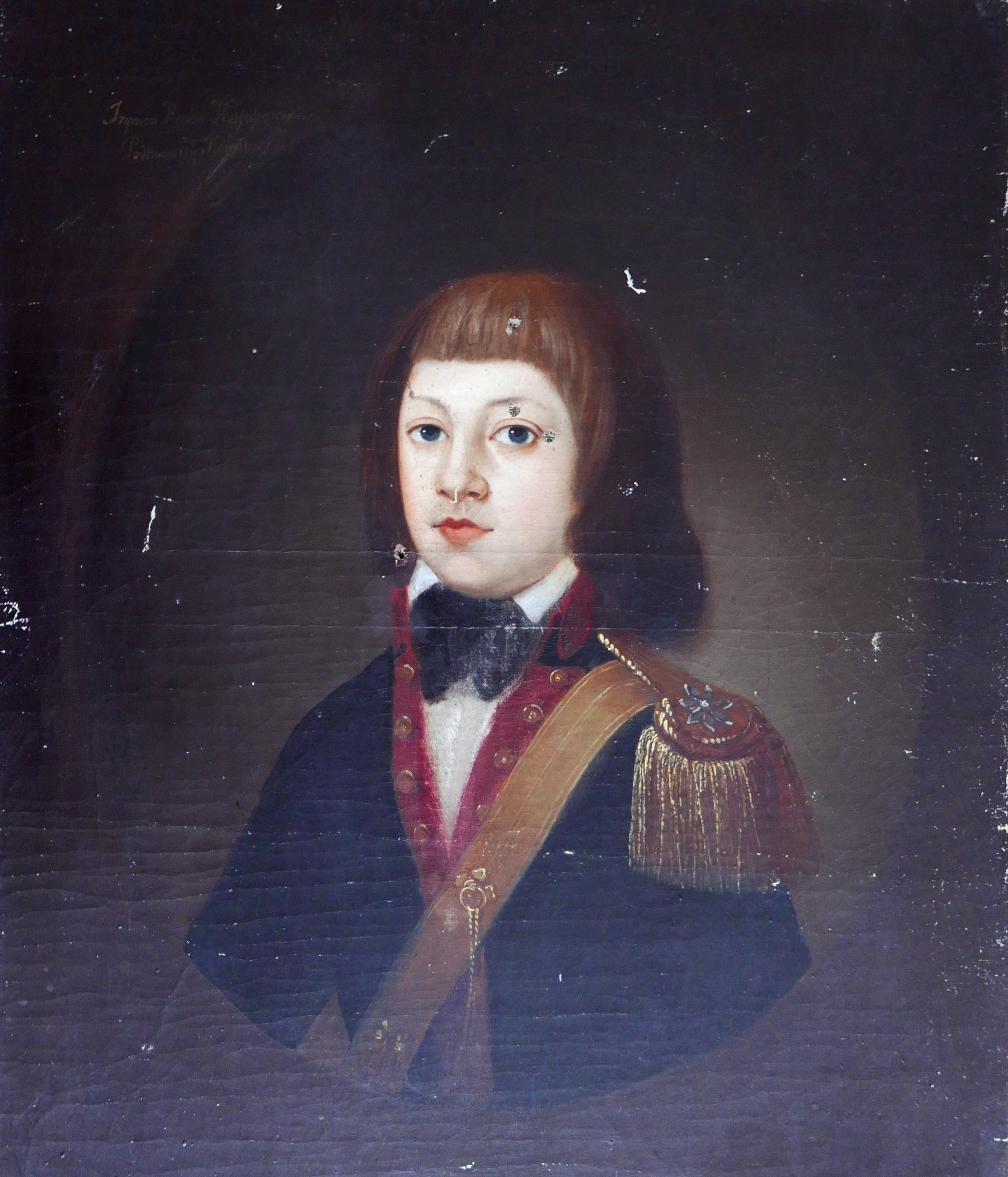 Беларуская (тарашкевіца): Партрэт Сымона Касакоўскага (Symon Kasakoŭski)